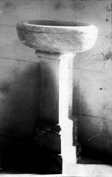 Weihwasserbecken in der Kirche Saint-Rémi in Pierrefitte-sur-Loire